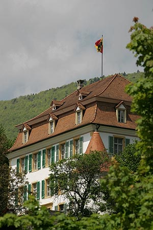 Le Château de Moutier (Préfecture et le Tribunal de district)